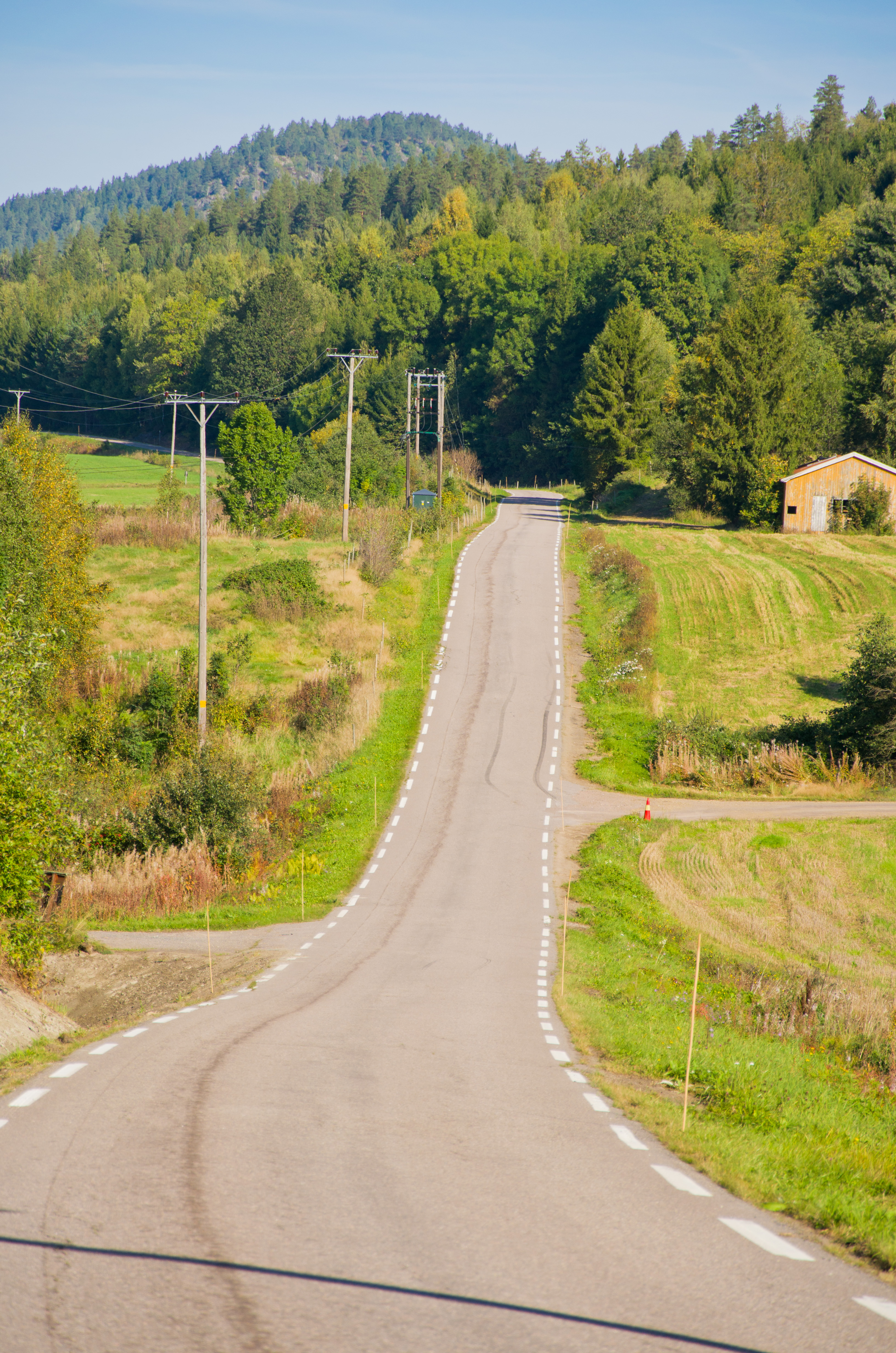 Fylkesvei 610 Vestbygdveien